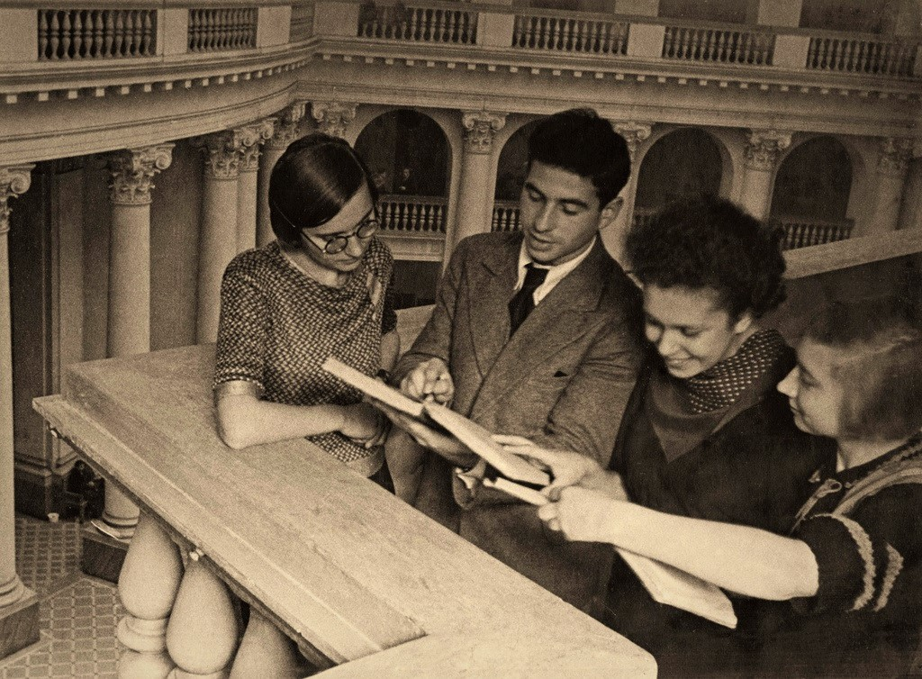 Студенты Московского государственного педагогического института имени А. С. Бубнова